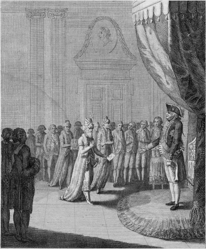 Vorstellung der Audienz welche seine Mayestät der König von Preussen, Friedrich Wilhelm der II., den Türckischen Gesandten Asmi Achmet Effendi den 21. Februari 1791 gegeben